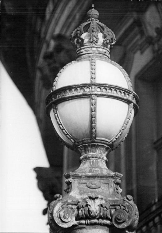 Berlin, Bodemuseum, Lampe, Detail ADN-ZB Settnik 11.4.85 Berlin: Bodemuseum Diese Kugelleuchte an der Monbijoubrücke weist dem Besucher des Bodemuseums noch heute den Weg. Sowohl die Brücke mit den Leuchten als auch das Museum sind vom Berliner Architekten Ernst von Ihne entworfen worden. Information added by Wikimedia users. Bode-Museum Native nameBode-MuseumLocationBerlinCoordinates52° 31′ 19″ N, 13° 23′ 41″ E Established1904Website control VIAF: 131826984 LCCN: nr2007002827 GND: 16319237-6 SUDOC: 120850370 WorldCat